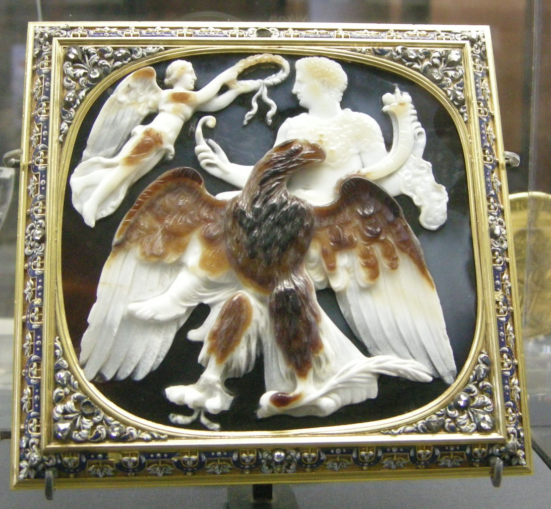 CdM, apoteosi di claudio, sardonice attr. a skylax, roma, 54 dc. circa